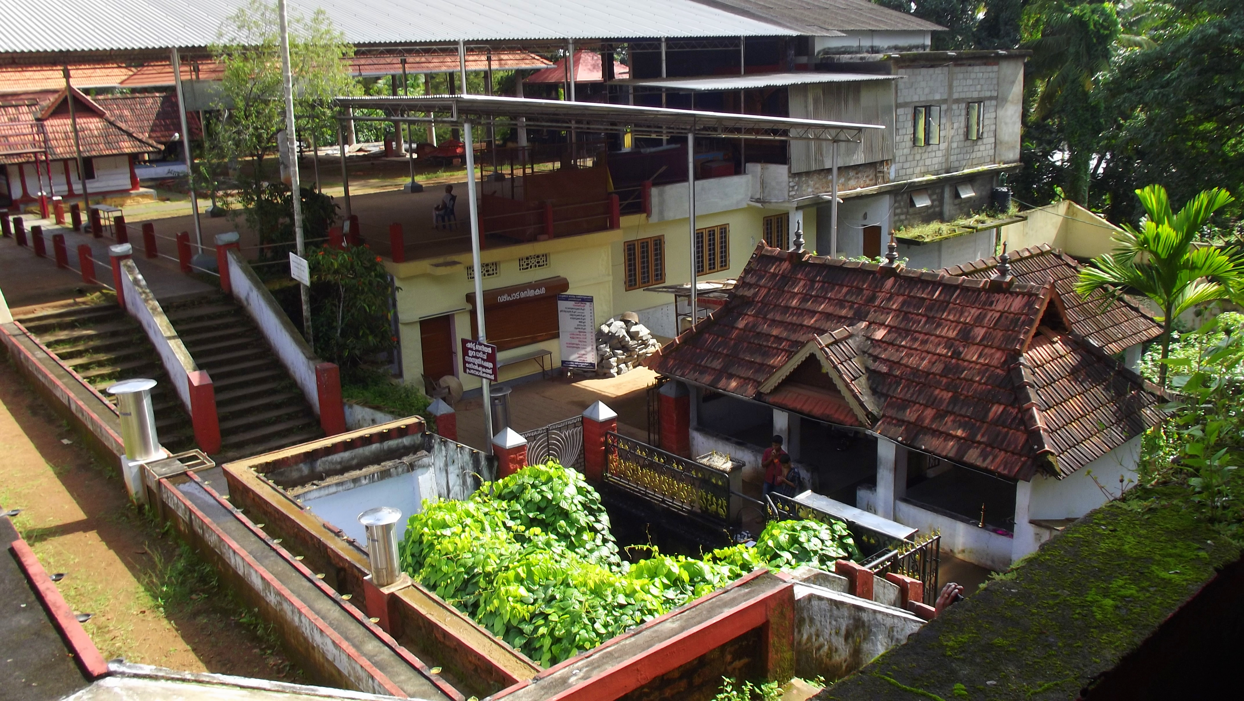 പനച്ചിക്കാട് ക്ഷേത്രം